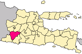 carte indonésienne